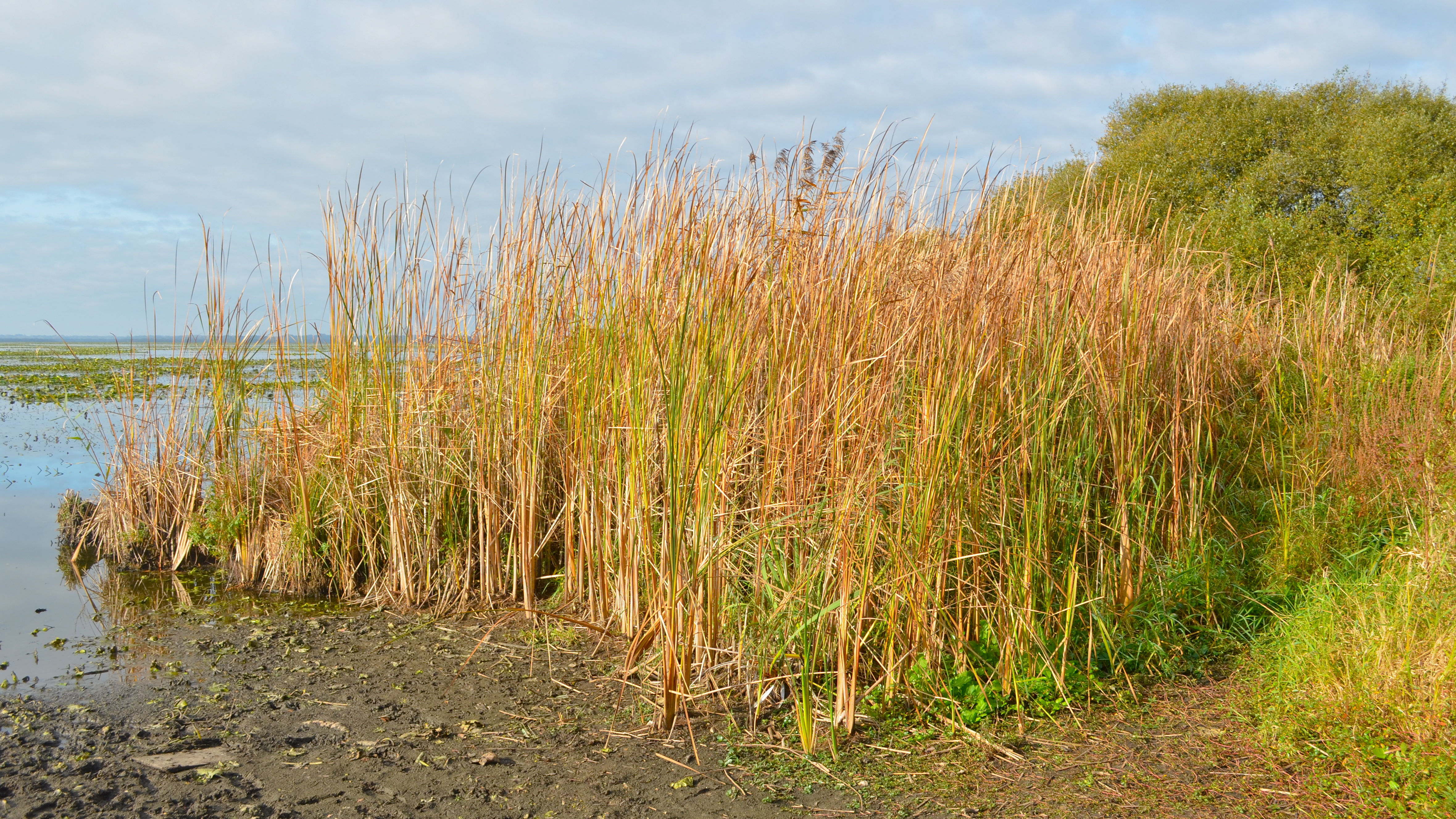 Lac de Grand-Lieu, site de Pierre aiguë - Saint-Aignan-de-Grand-Lieu (Loire-Atlantique)